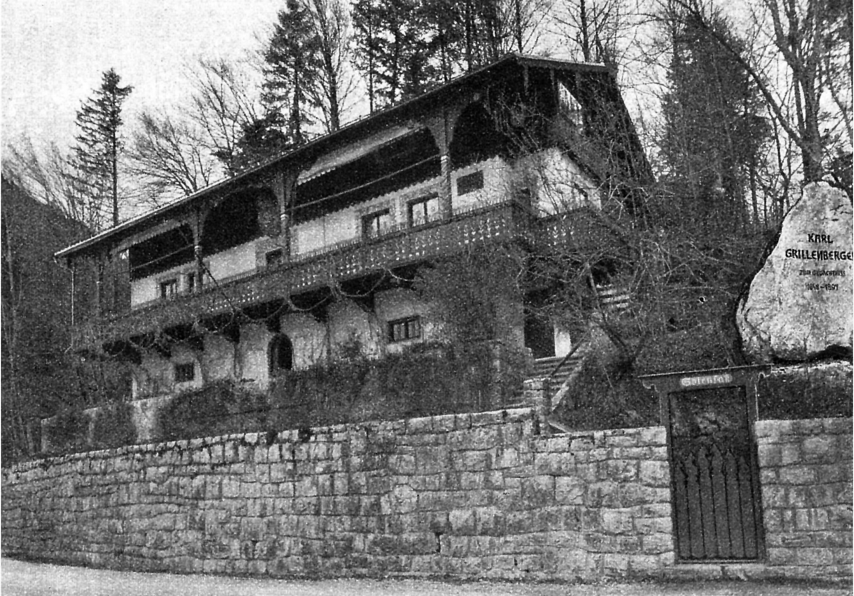 Villa Sojensaß, Wohnort Georg von Vollmar, Eigentümerin Julia von Vollmar-Kjellberg in Urfeld am Walchensee